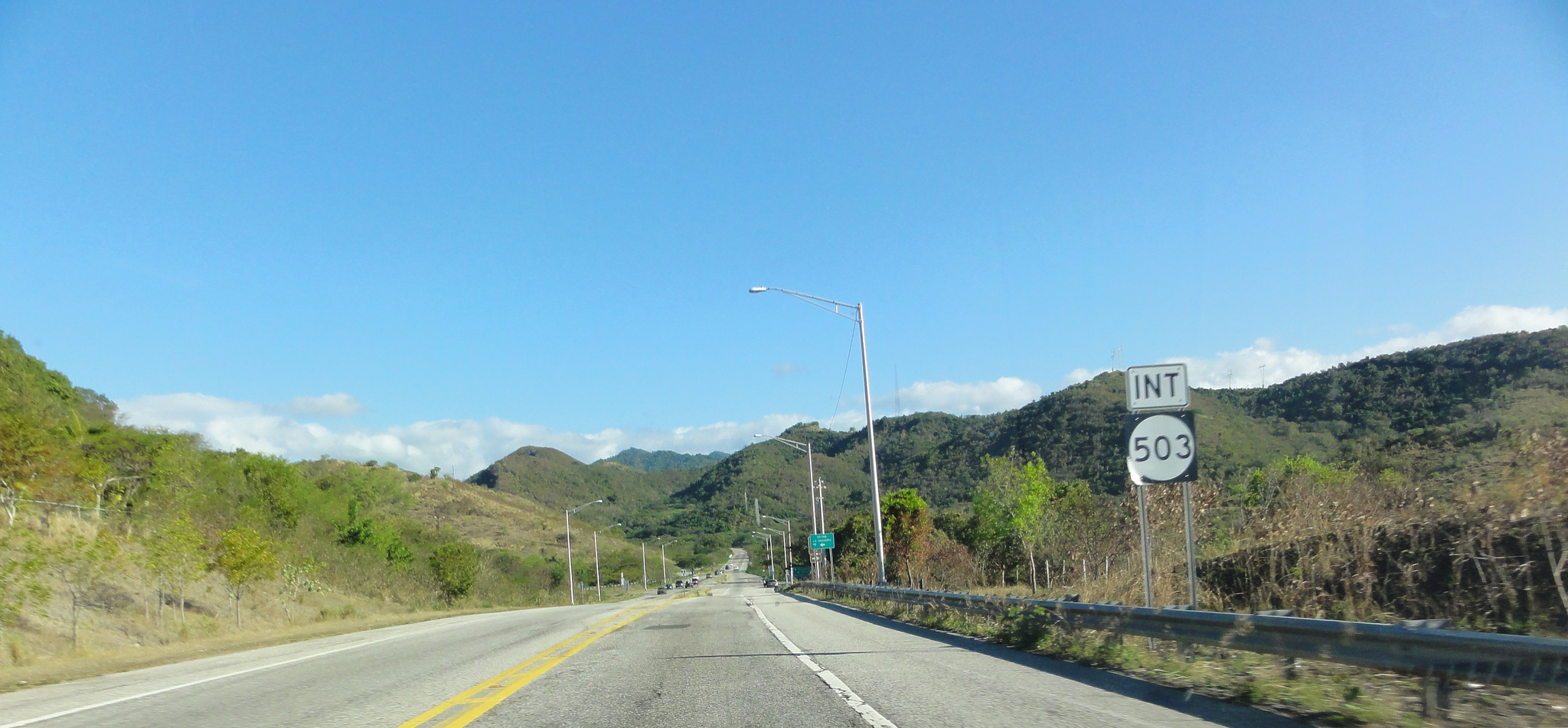 Escena en el Barrio Tibes (PR-10 Norte cerca de la PR-503), Ponce, Puerto Rico